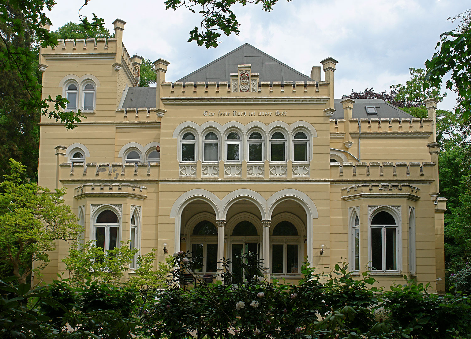 Villa Leupold, Leher Heerstraße 194, Bremen. Erbaut: 1872. Architekt: Poppe, Johann Georg Das abgebildete Objekt ist ein geschütztes Kulturdenkmal in der Freien Hansestadt Bremen, mit der Nr. 0843,T beim Landesamt für Denkmalpflege registriert.